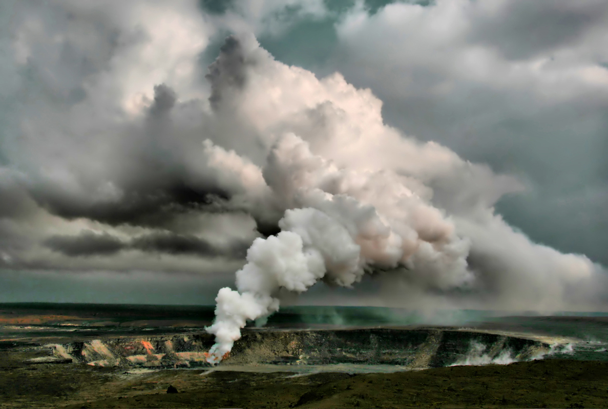 sulfur dioxide emissions from the Halema`uma`u vent, Kīlauea